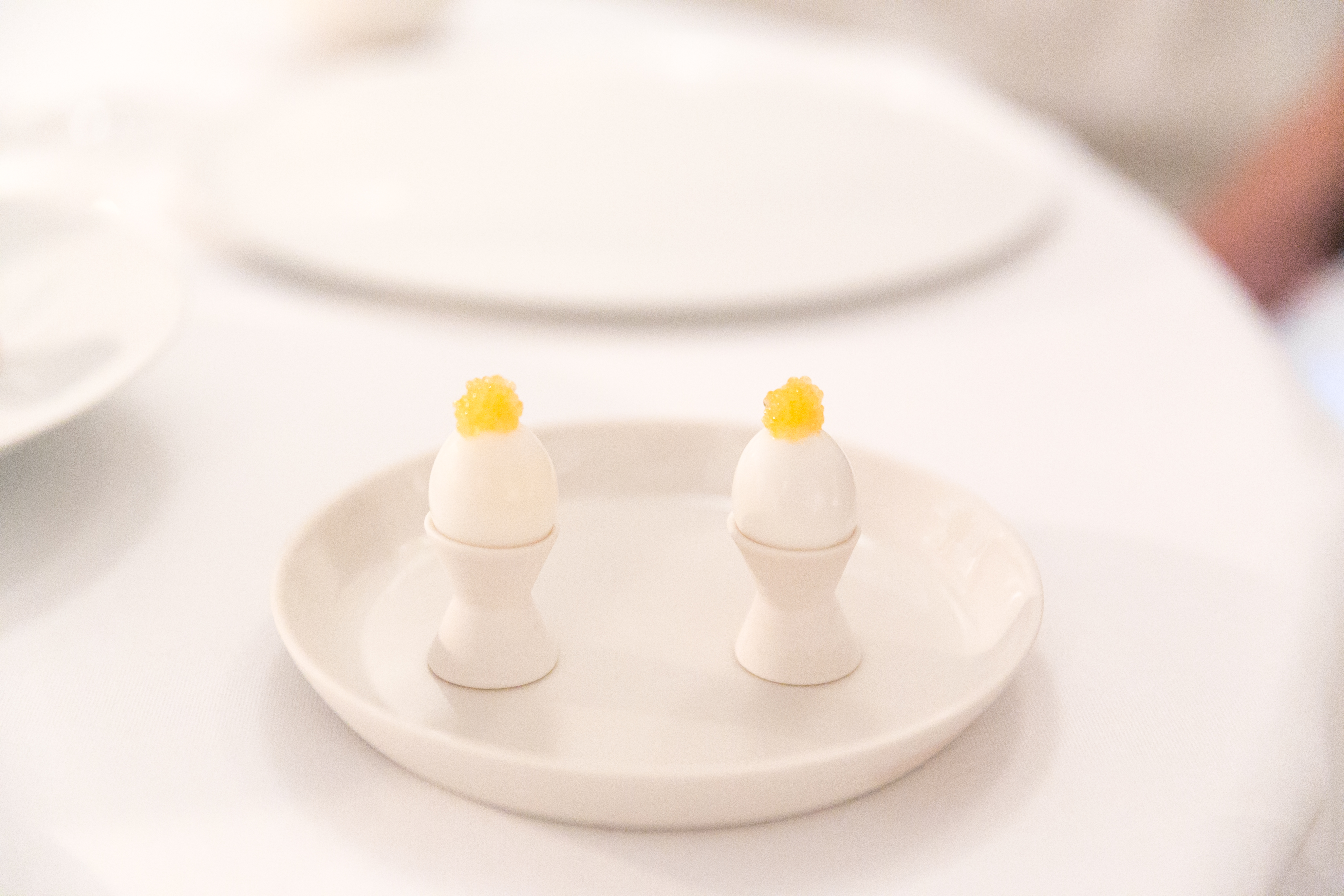 Amuse Bouche: Boiled quail egg at Kong Hans Kælder